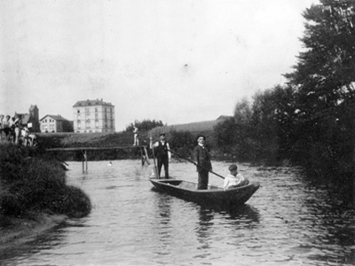 Das Hausener Bad auf einer Fotografie aus dem Jahre 1904